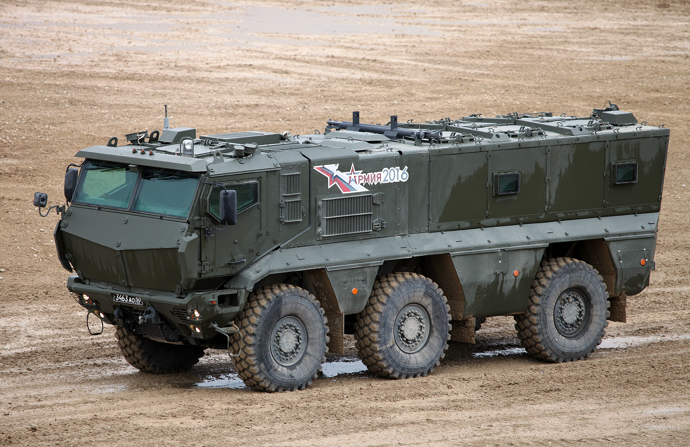 КАМАЗ-63968 Тайфун-К (KAMAZ-63968 Typhoon-K MRAP vehicle)